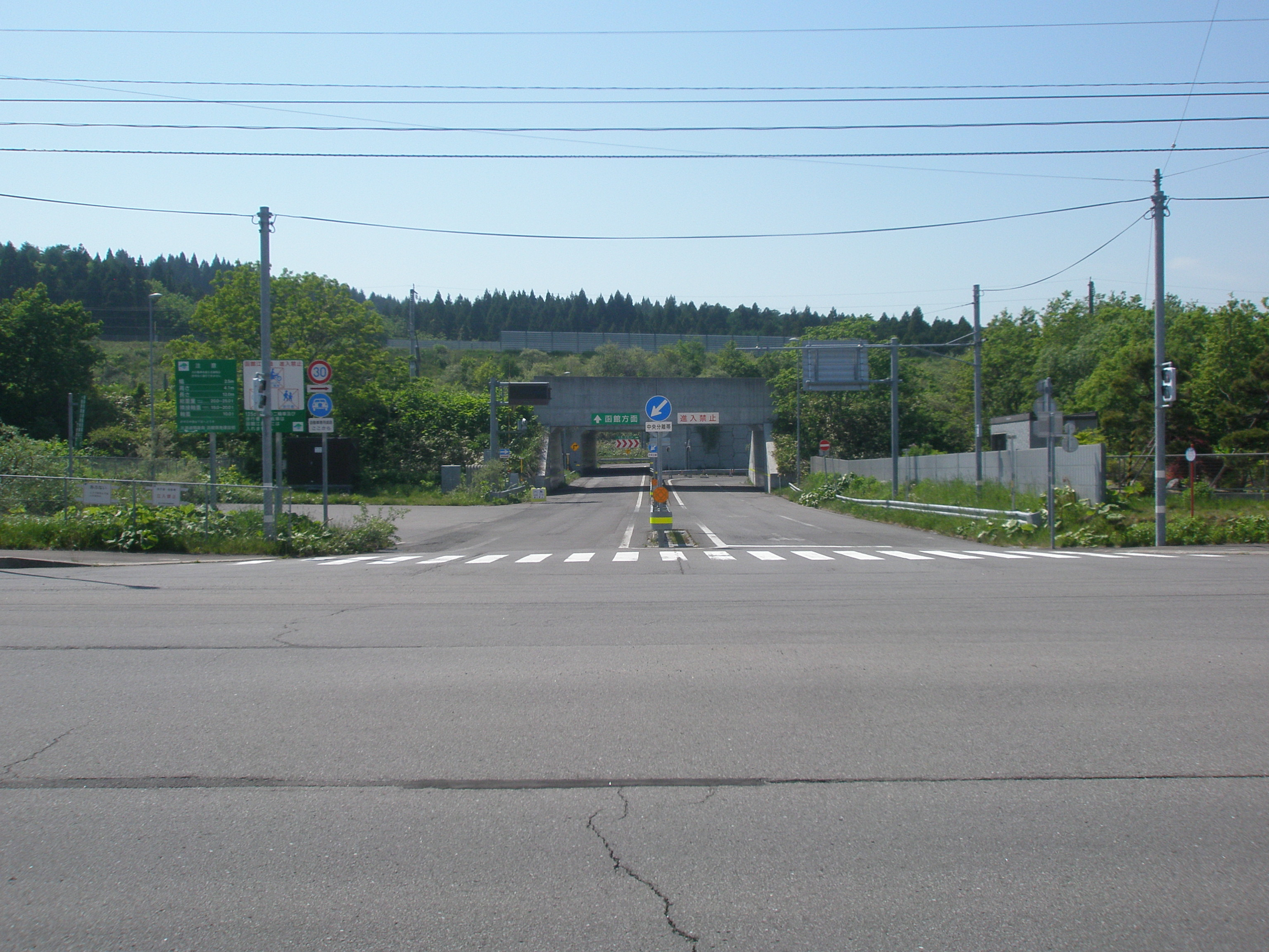 北斗富川インターチェンジ・入口（2019年5月撮影）